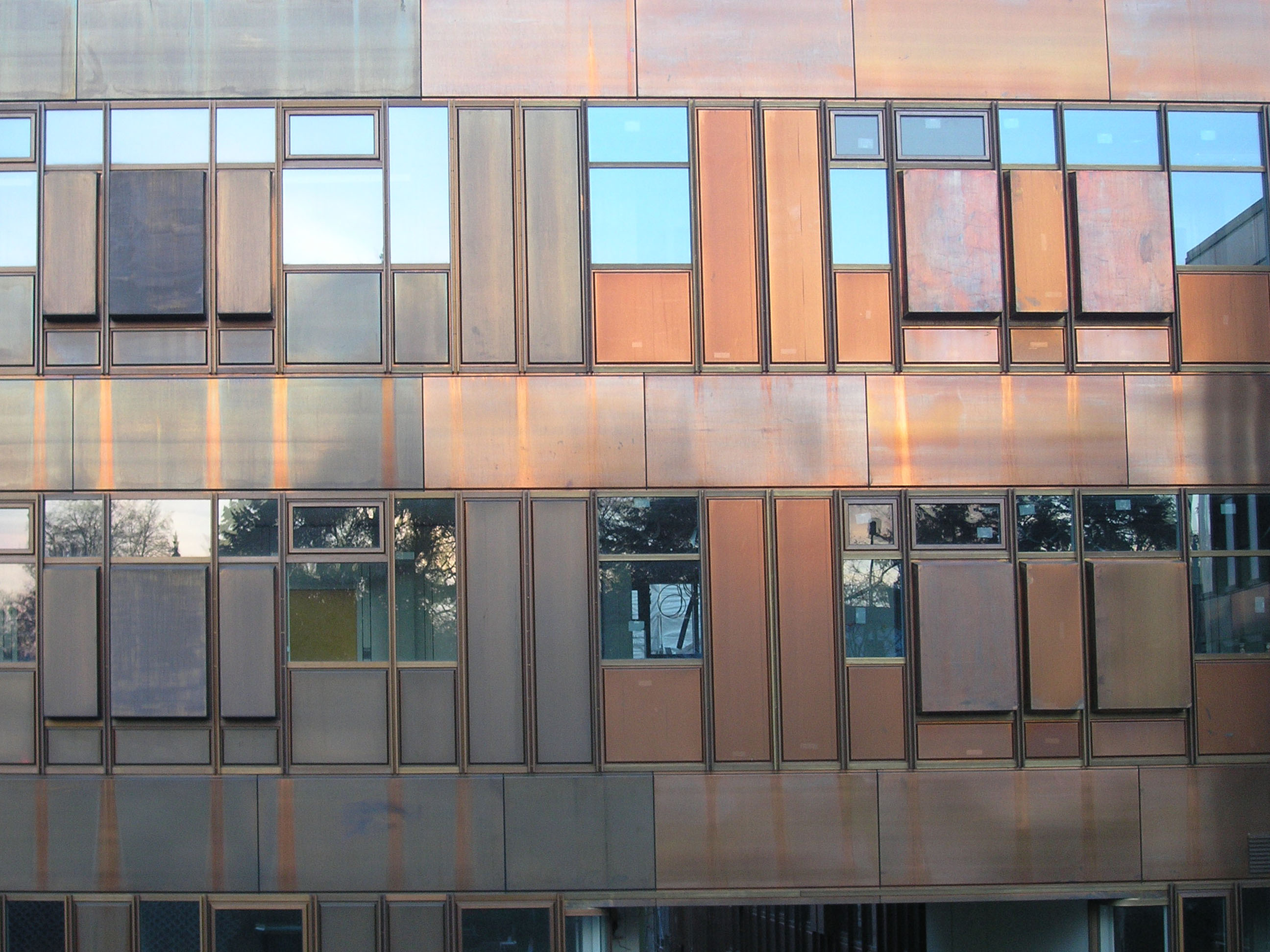 Fassade der Rostlaube aus Corten-Stahl